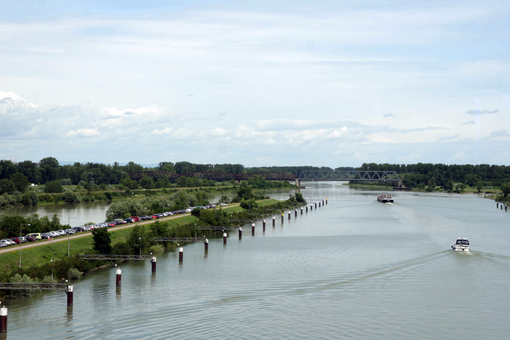 Die Wintersdorfer Rheinbrücke von der Staustufe Iffezheim gesehen. Der rechte Teil wurde in den 1970er-Jahren als Stahlfachwerkbrücke beim Bau der Rheinstaustufe neu erstellt und überquert den zur Schleuse führenden Schifffahrtskanal.